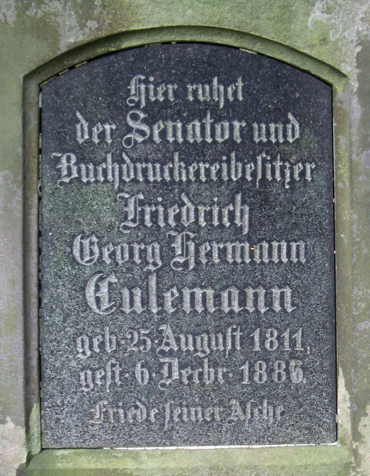 Detailansicht des Grabmals Friedrich Georg Hermann Culemann auf dem Stadtfriedhof Engesohde, Hannover, Abteilung 2, Grabstelle 4a-c